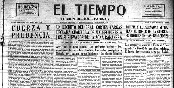 Page du journal El Tiempo paru le 10 décembre 1928